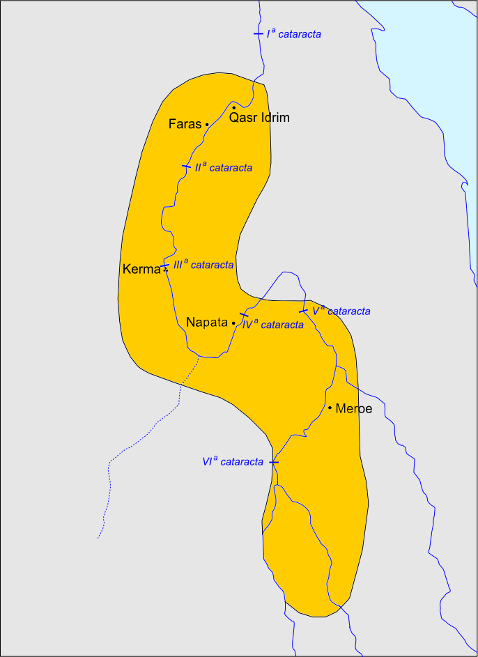 Extension dau Reiaume de Kusk entre lei sègles VII e I av. JC.